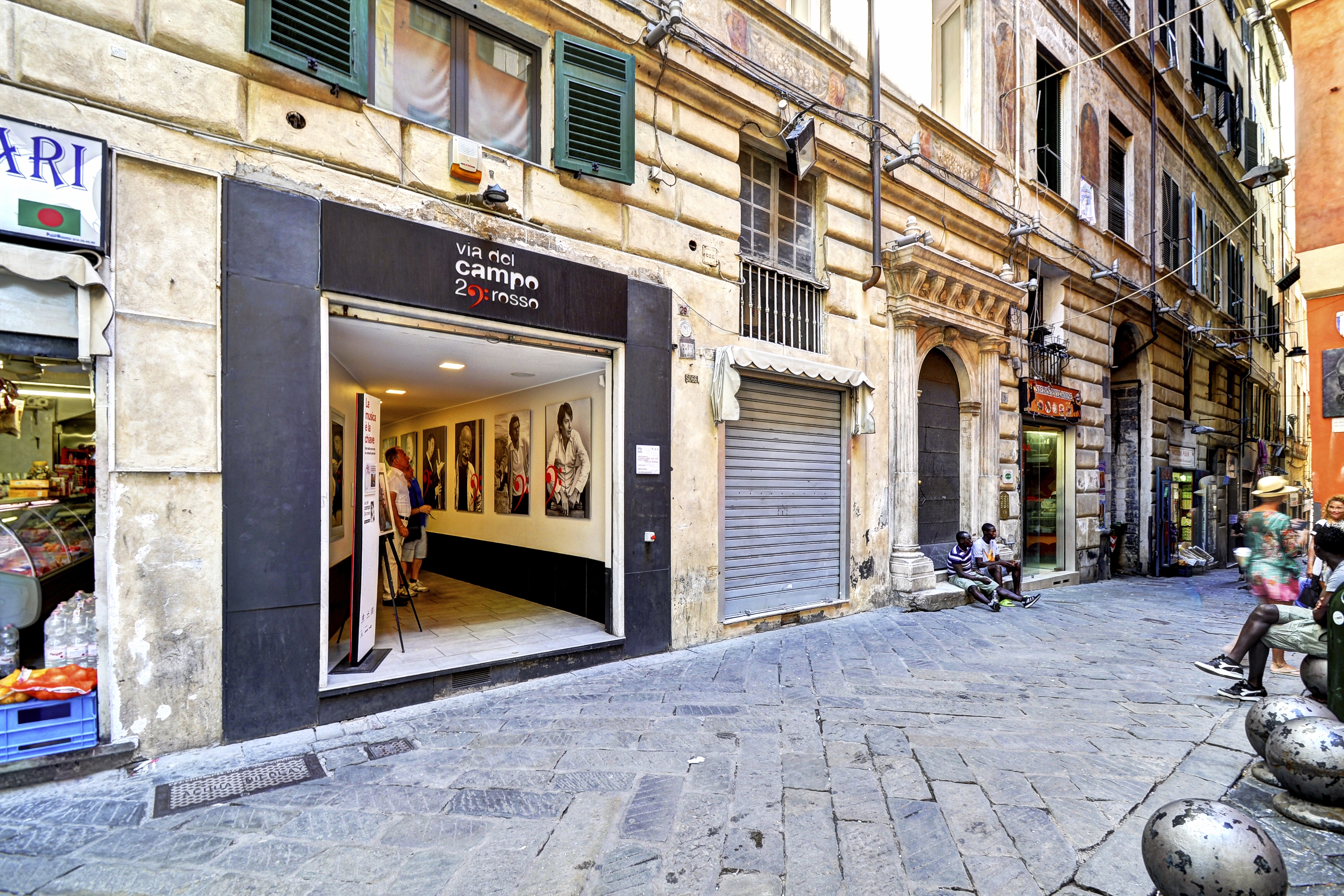 Via del Campo 29r – Emporio museo musicale This is a photo of a monument which is part of cultural heritage of Italy.